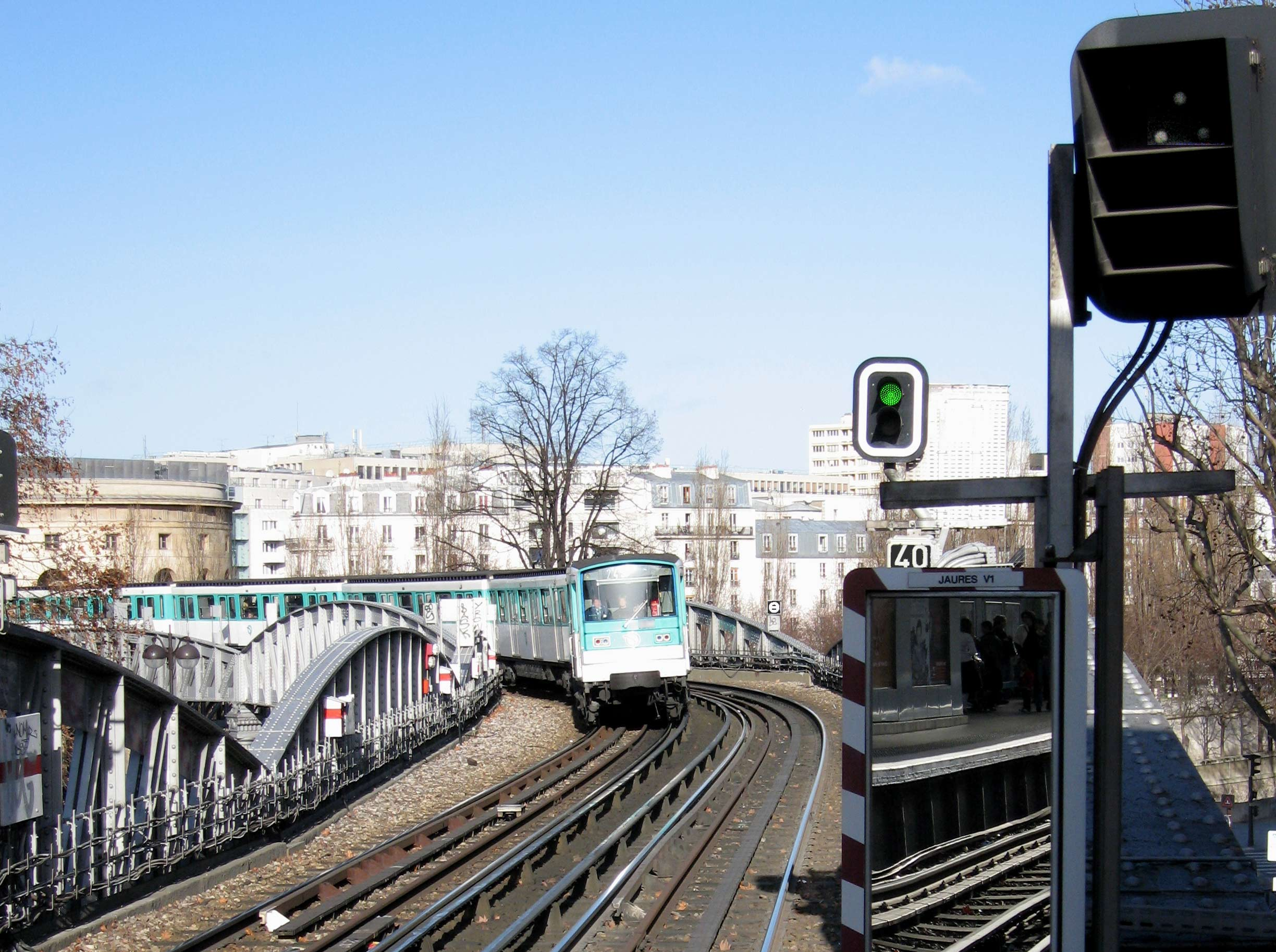 Signalisation Métro de Paris, Station Jaurès (ligne 2), Paris, France